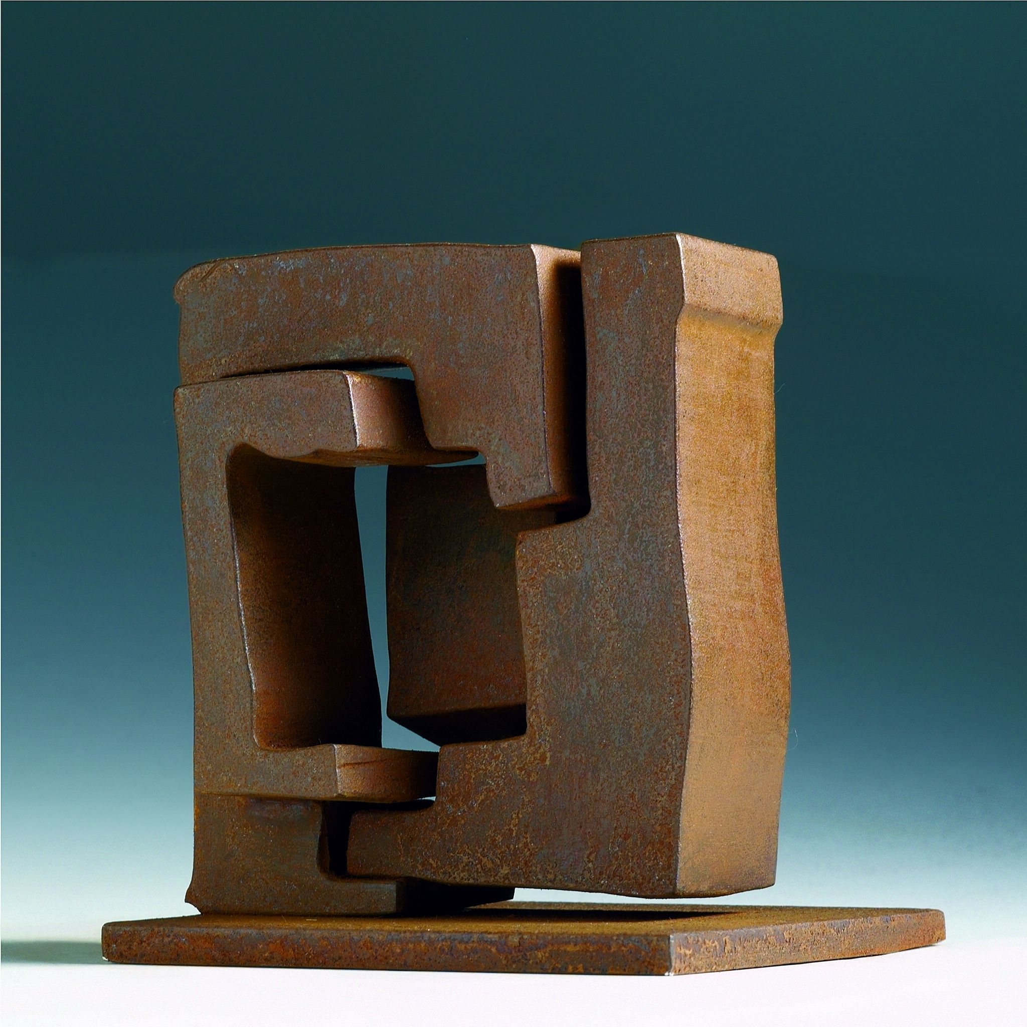 Escultura Pequeño formato